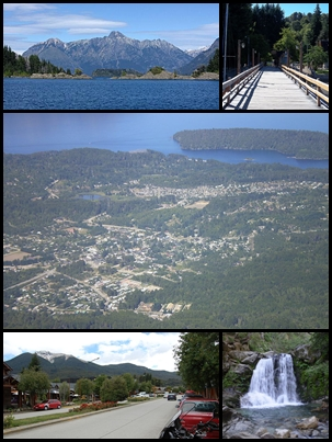 Montaje de Villa La Angostura, Patagonia Argentina